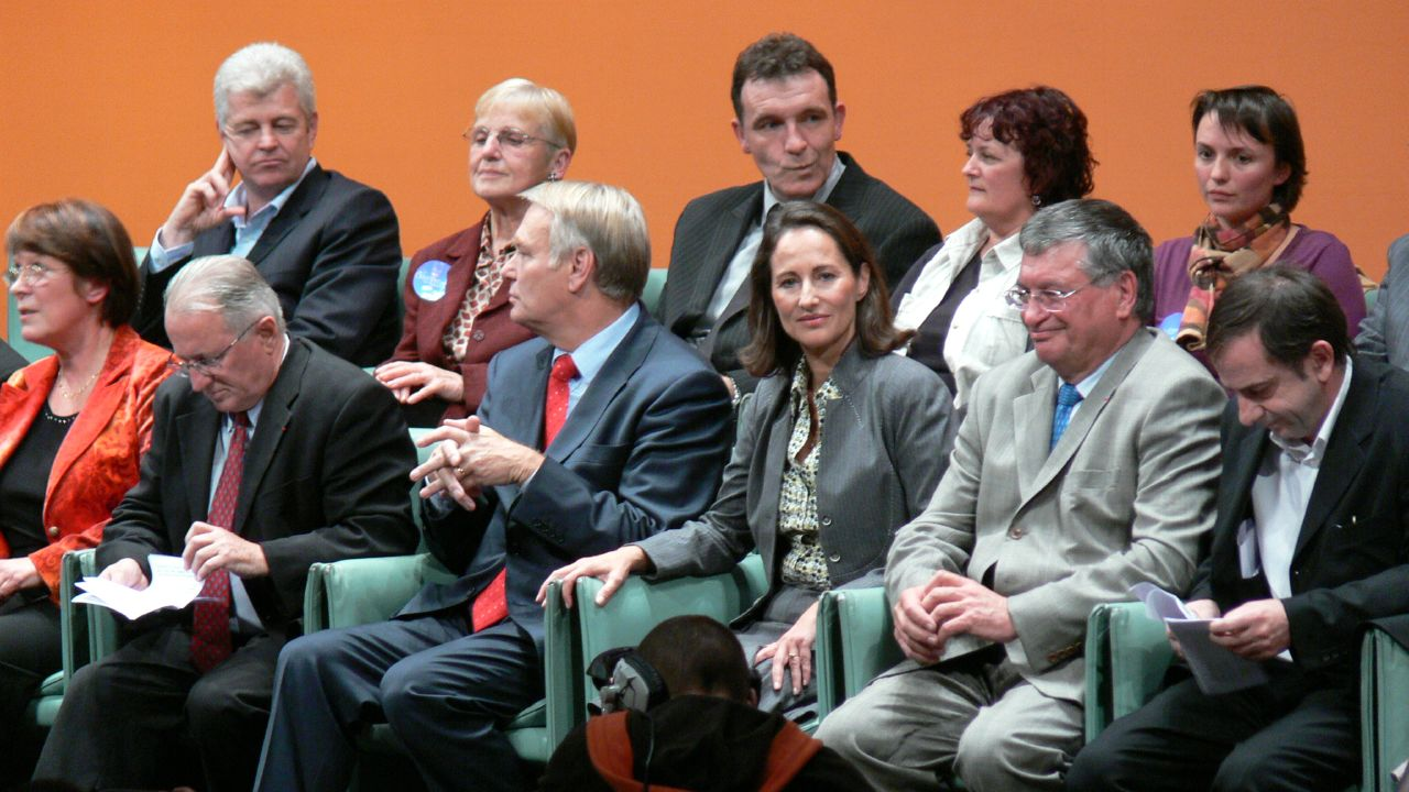 Letzte Sitzung unter Ségolène Royal im Kongress von Nantes